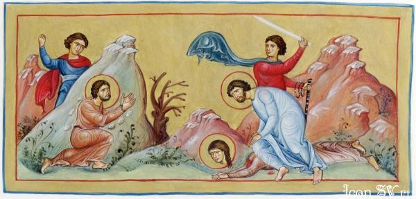 Святой апостол Филимон и его супруга Апфия Копия миниатюры XI века. Константинополь. (учащихся Иконописной школы). ГИМ. Москва.